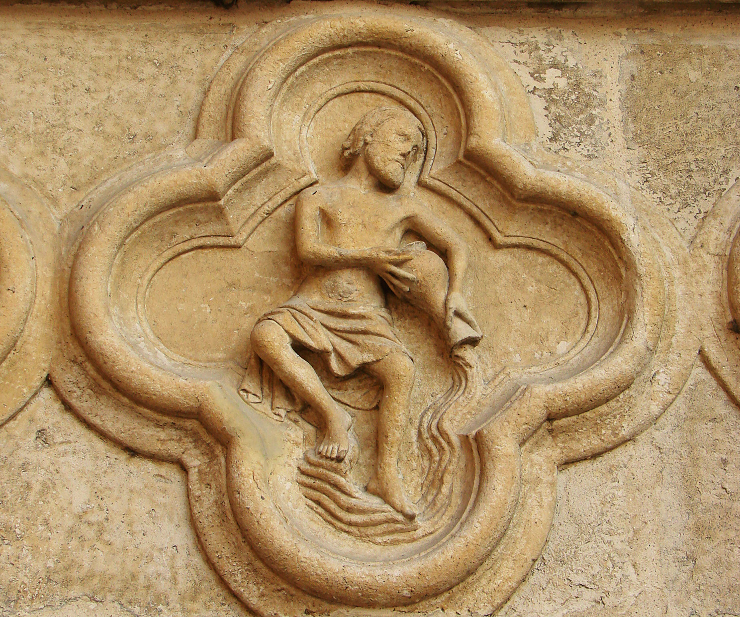 Le verseau (Aquarius) ;un des signes du zodiaque complet figurant sur le portail gauche de la façade de la cathédrale d'Amiens.